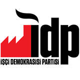 İşçi Demokrasisi Partisi amblemi